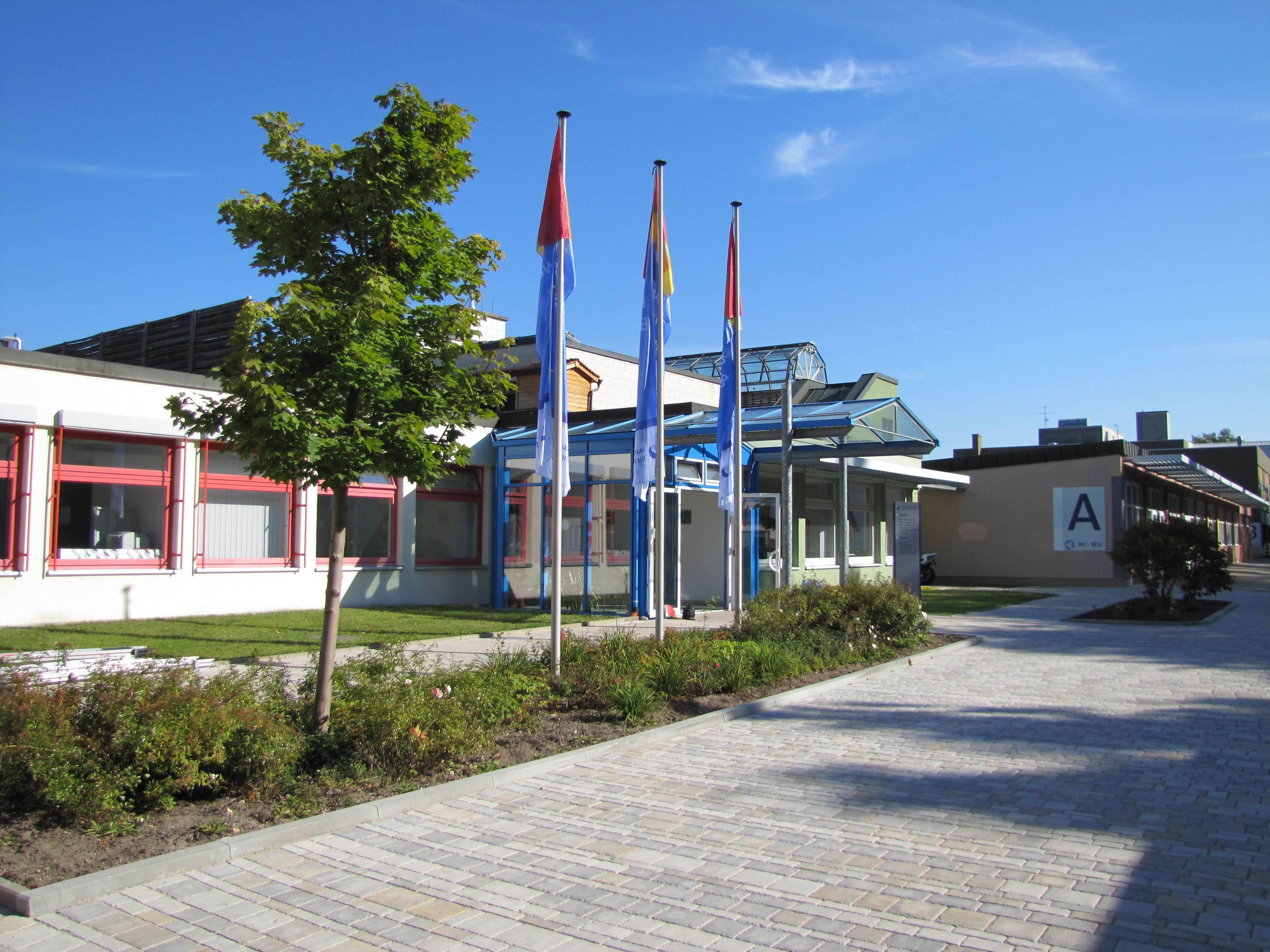 Das Bildungszentrum (BZ) 2 ist das größte der drei Bildungszentren der Handwerkskammer für Mittelfranken.